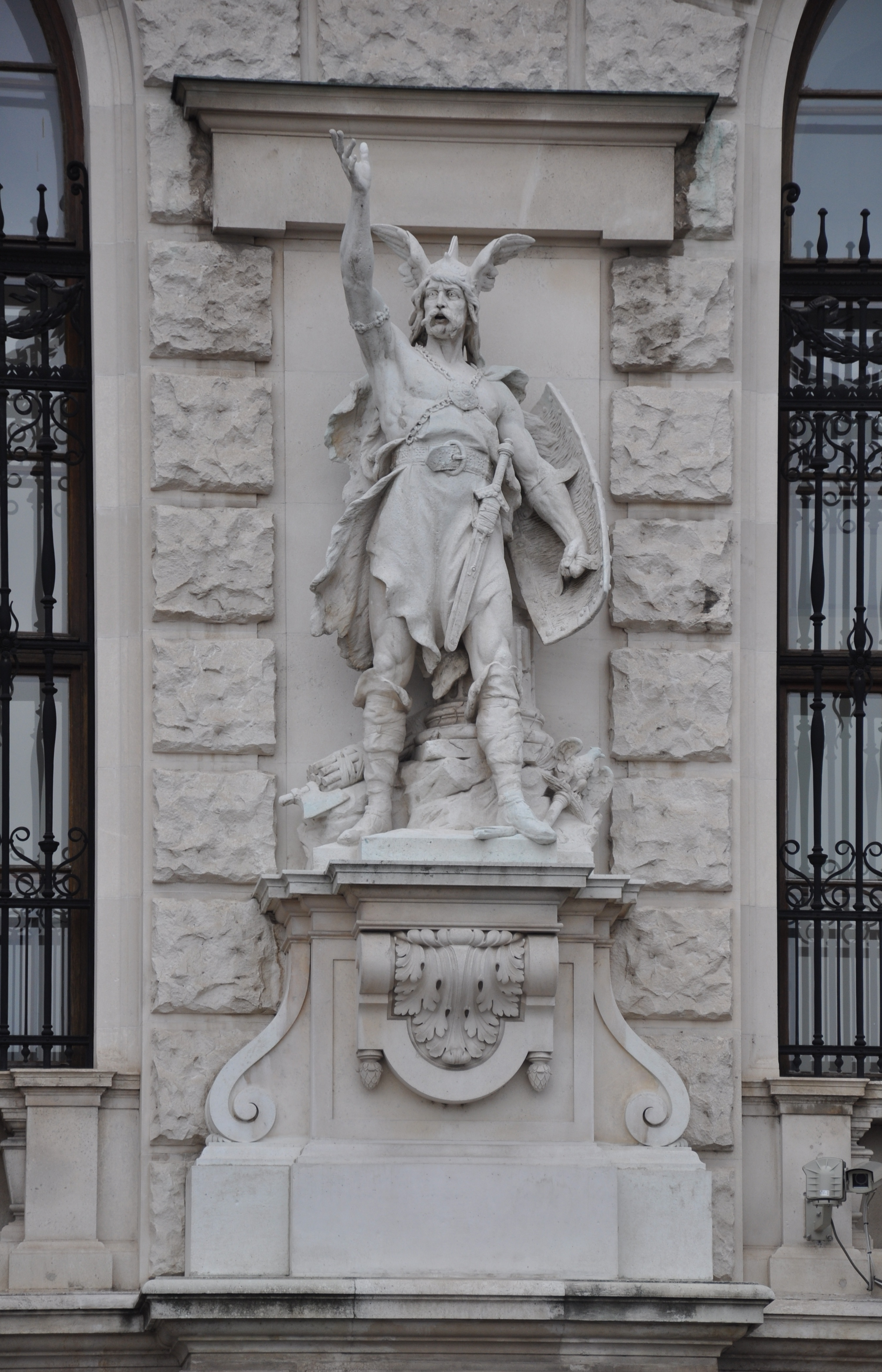 Wien, Neue Burg, Statuen an der Hauptfassade am Heldenplatz, zwanzig Gestalten der österreichischen Geschichte (verschiedene Bildhauer) Nr. 3: Anton Brenek: Bajuware